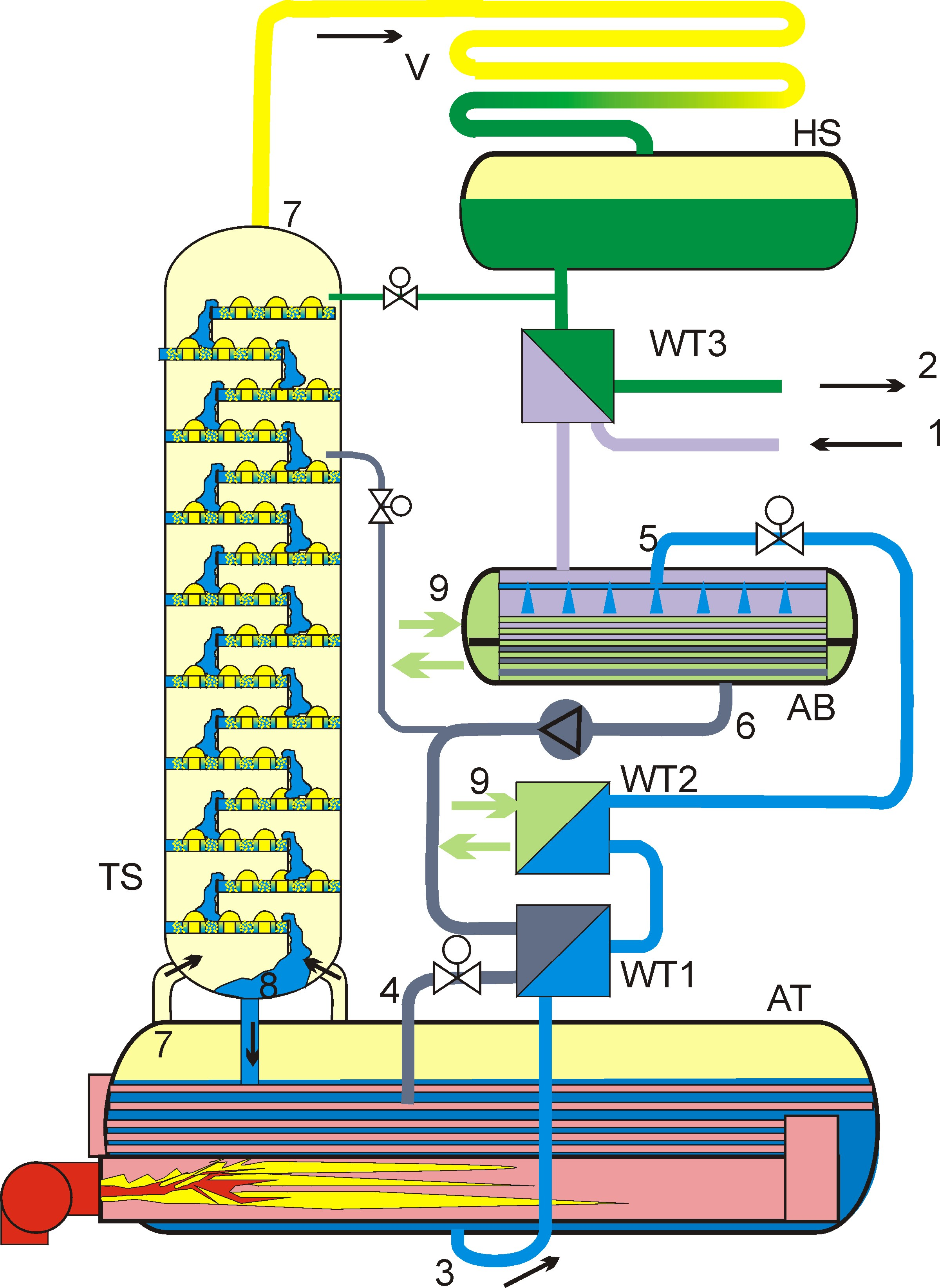 Industrielle Ammoniak-Wasser-Absorptionskälteanlage eigene Grafik. Absorptionskältemaschine